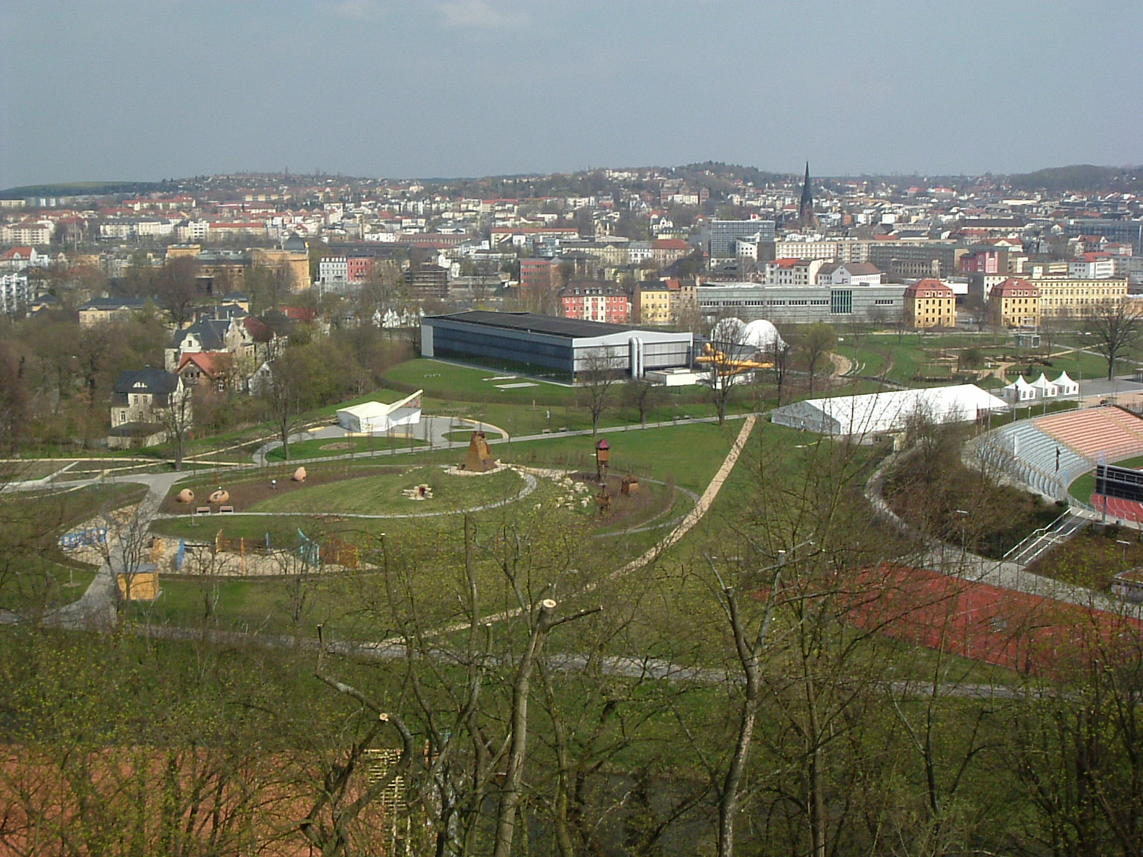 Hofwiesenpark before BUGA